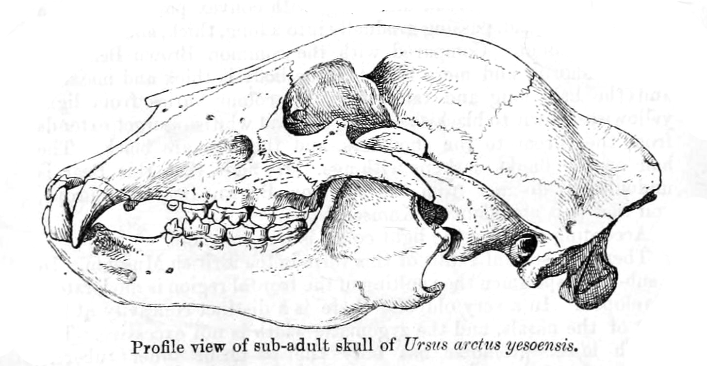 Ursus arctos yessoensis - skull